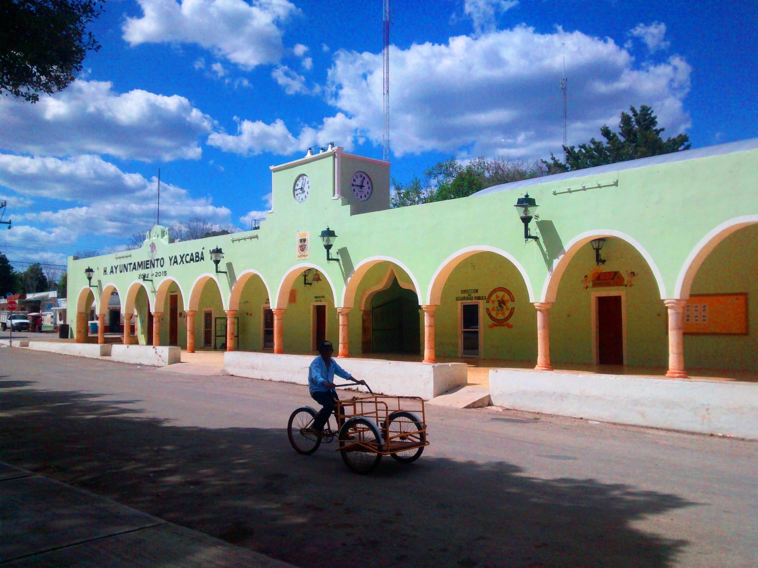 Palacio Municipal de Yaxcabá